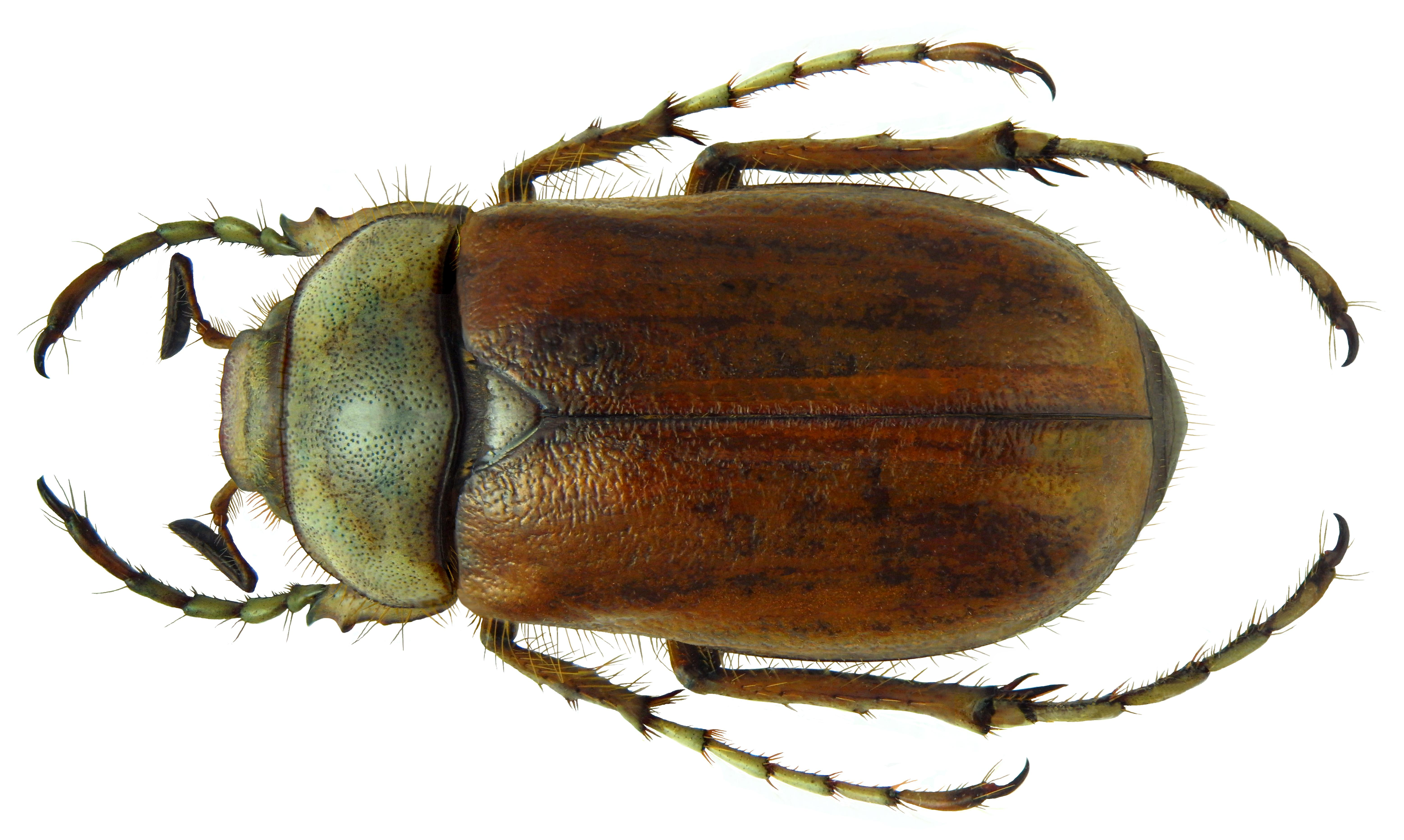 Familie: Scarabaeidae Groesse: 17,5 mm Fundort: Algerien, Ziama, Mansouria leg. Gerstmeier, 1986; det. J.Scheuern, 1993 Photo: U.Schmidt, 2011